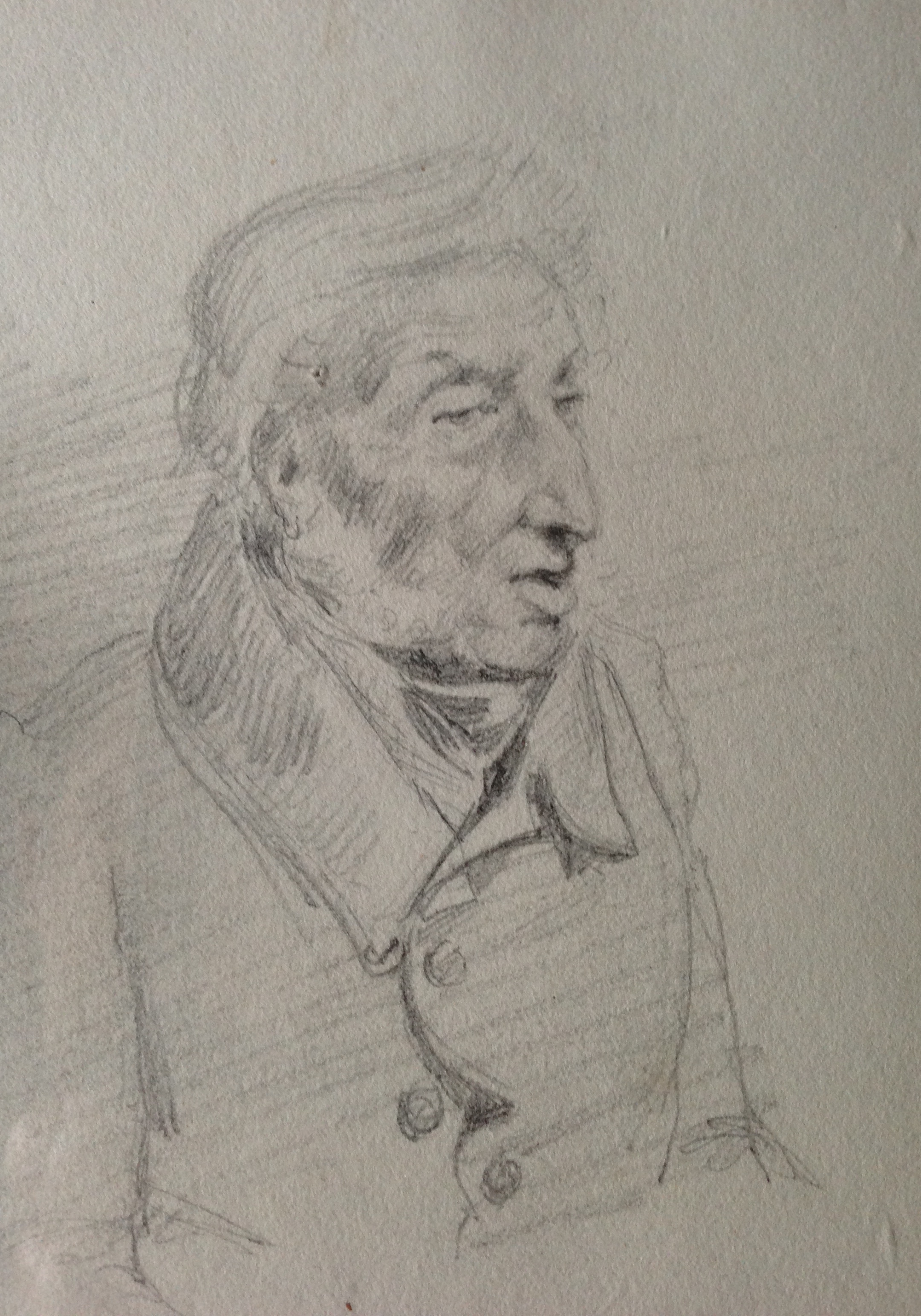 Crayon d'Olivier Bro de Comères (XIXème Siècle) Coll. Particulière